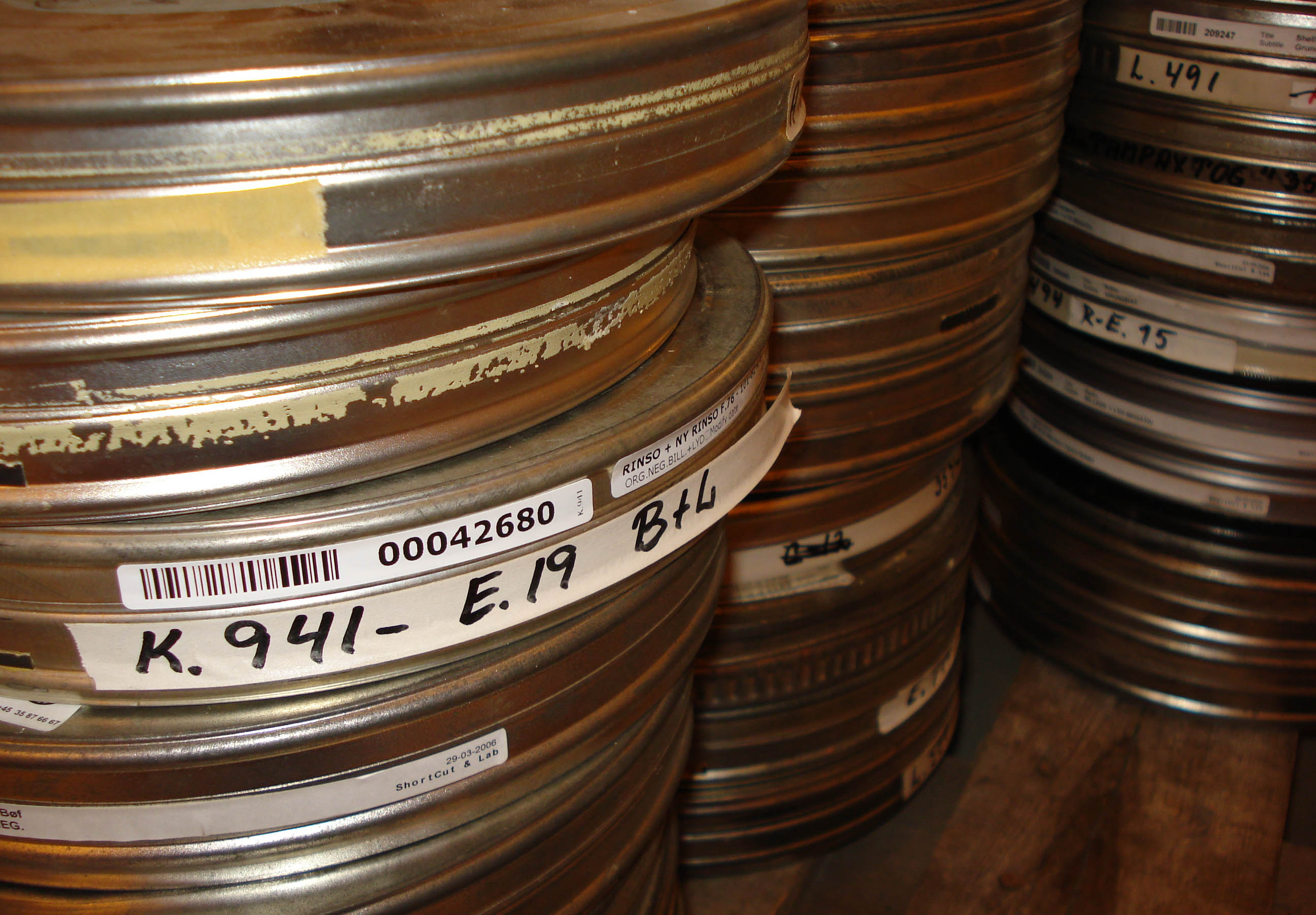 Blikdåse med reklamefilm på Statsbiblioteket.